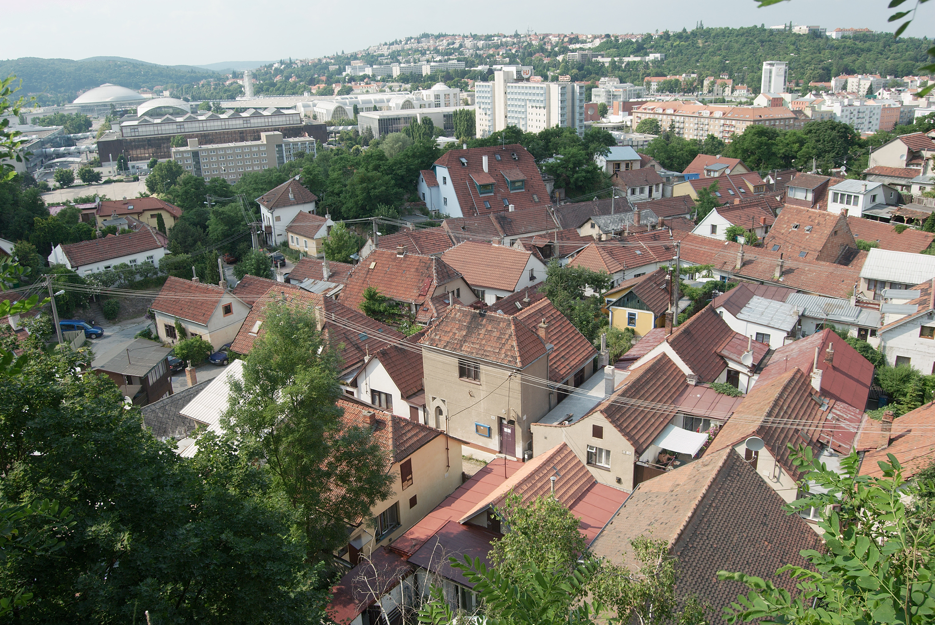 Brno - Kamenná kolonie (též Kamenná čtvrť) vyfotografovaná od jihu